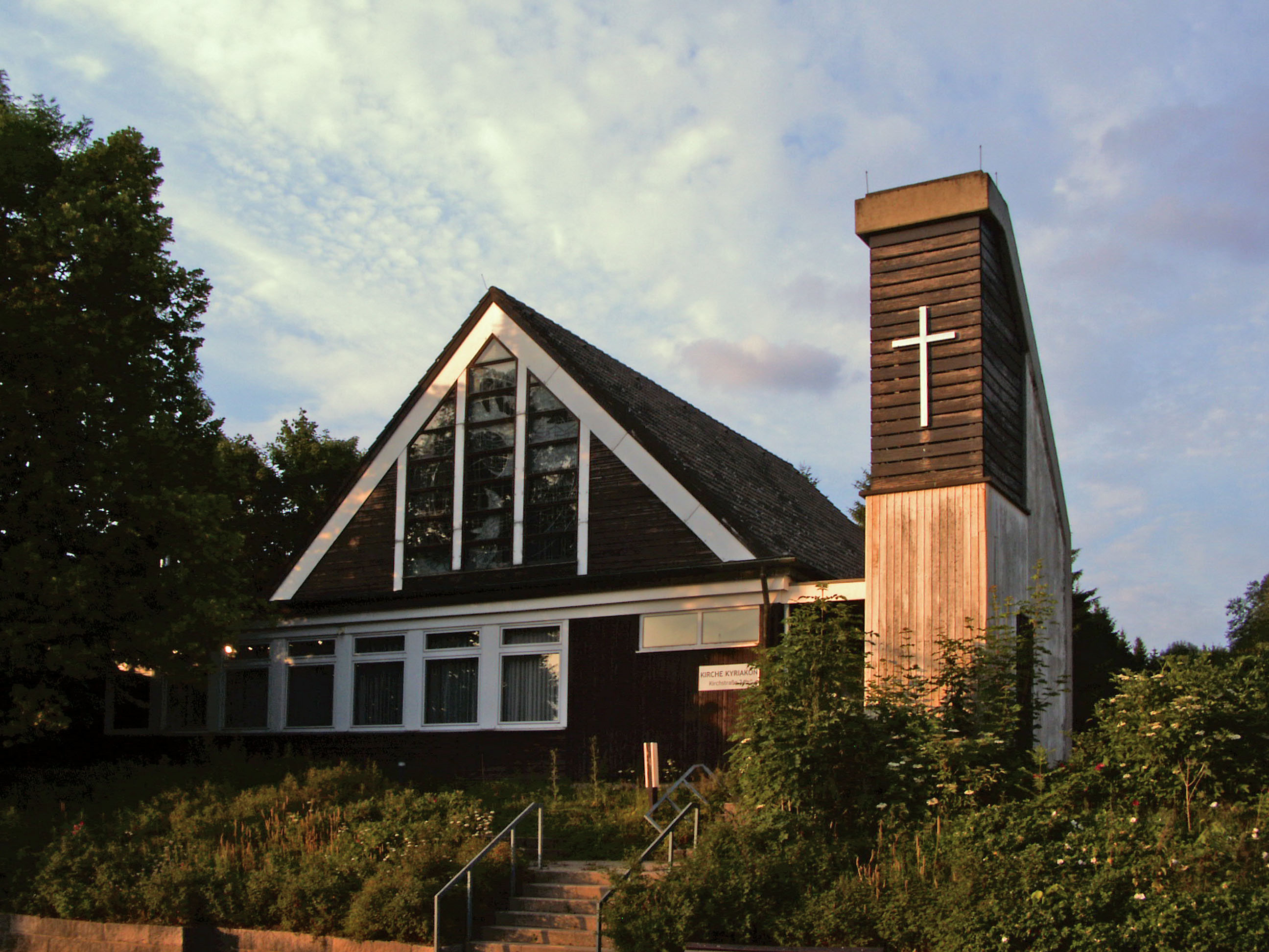 Kirche in Hohegeiß bei Braunlage (ehemals katholisch)